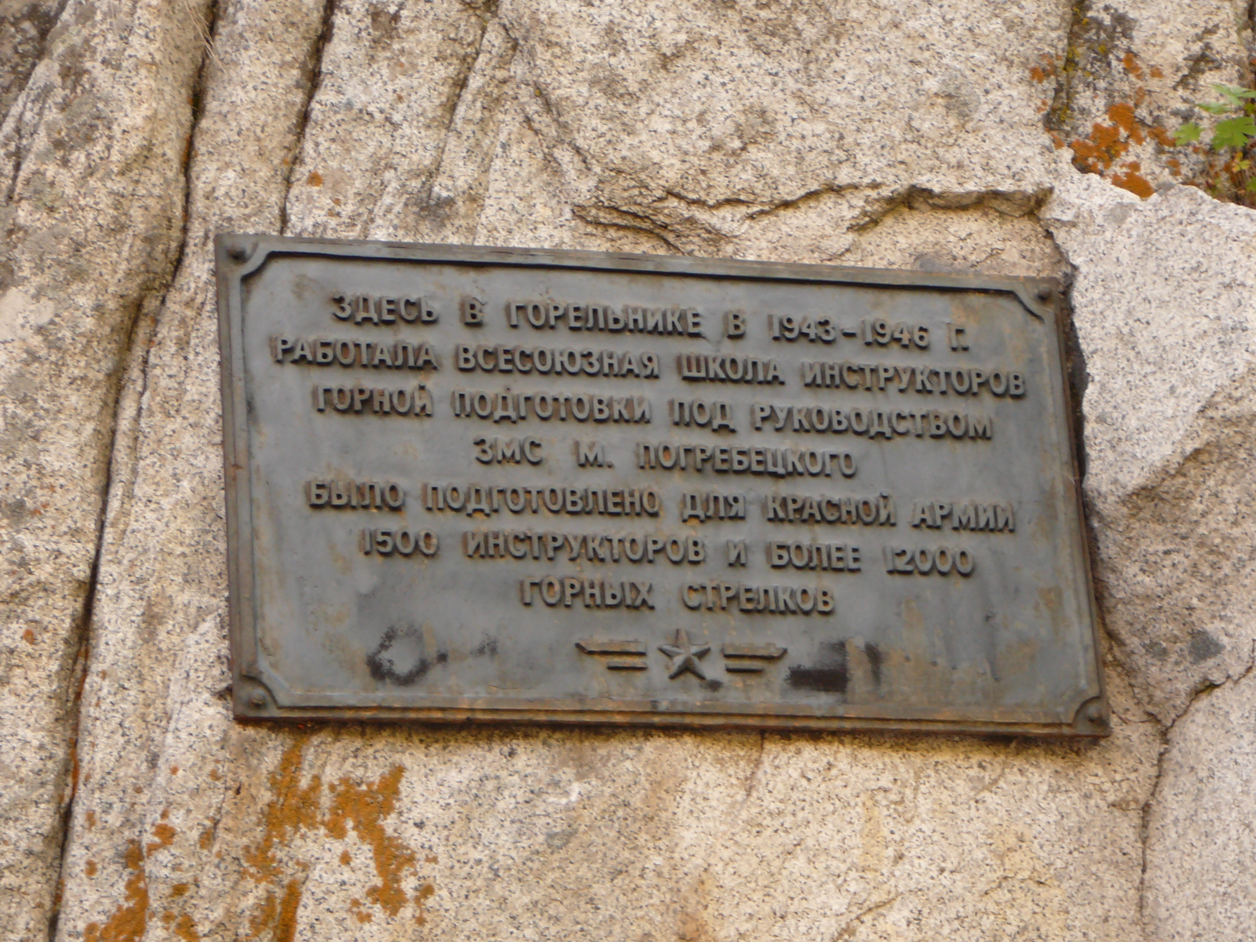 Памятная доска в урочище Горельник в 20 километрах южнее Алма-Аты, где в 1943-1946 годах существовала Всесоюзная школа инструкторов горнострелковой подготовки.